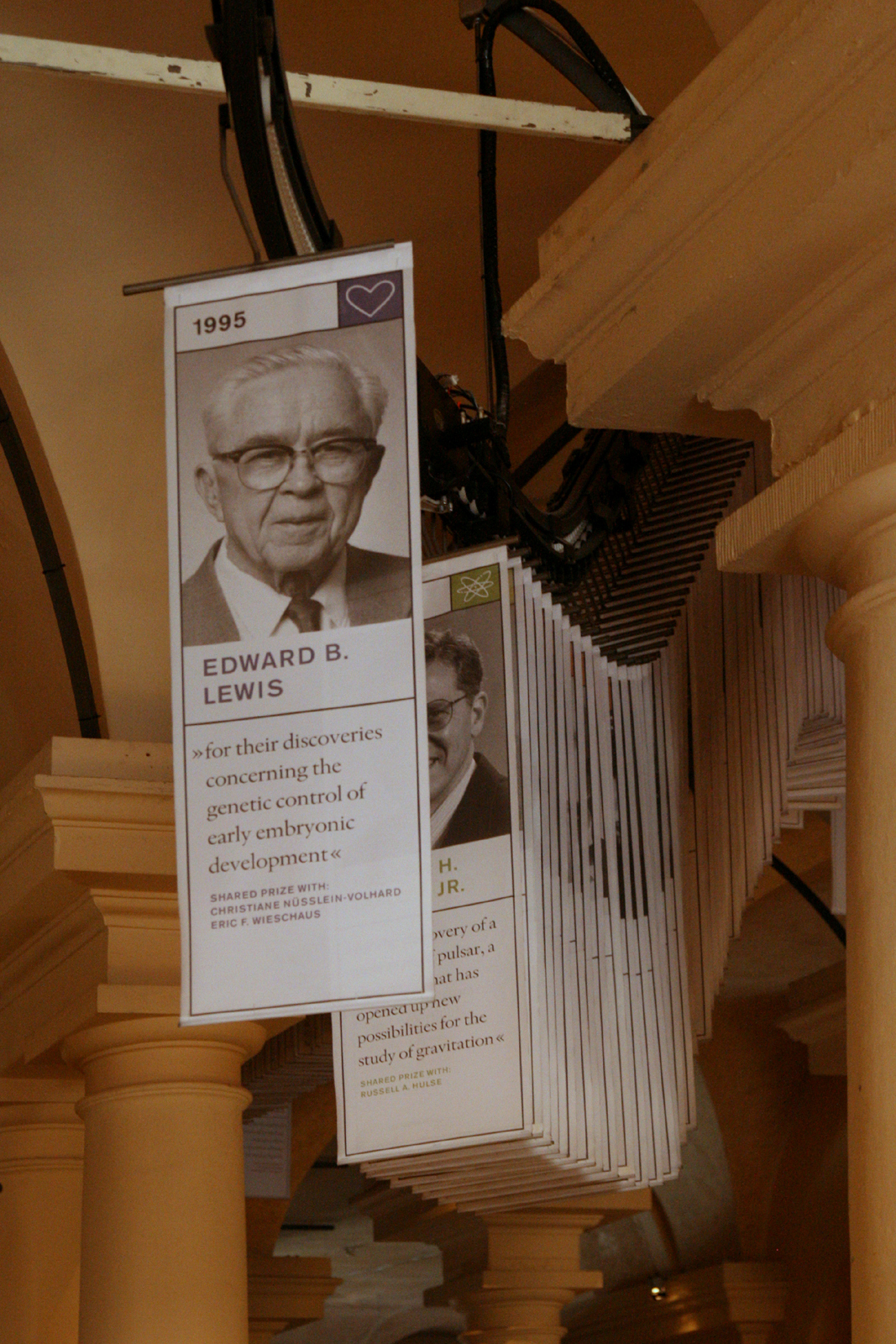 Interieur Musée Nobel à Stockholm